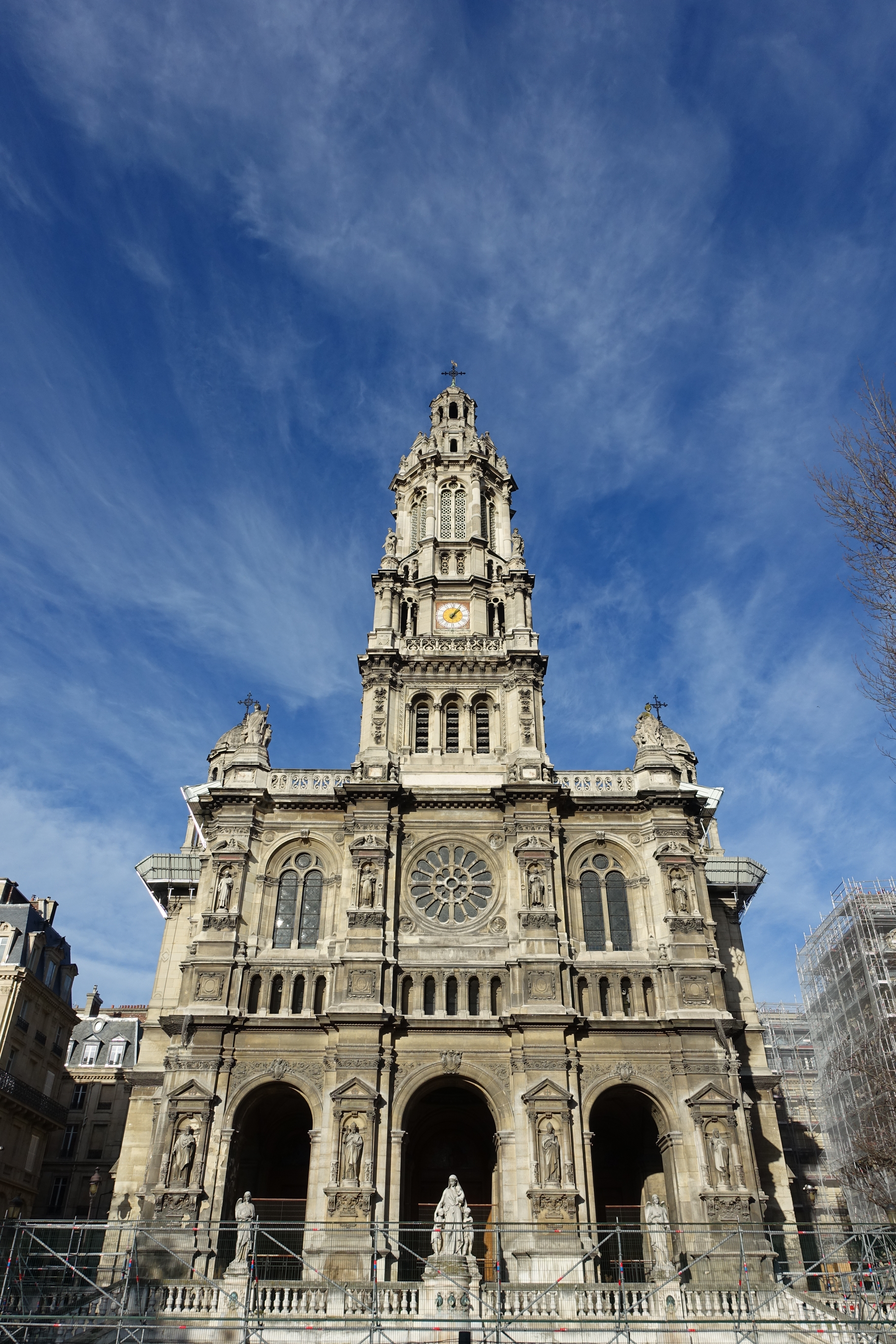 Trinité d'Etienne d'Orves @ Paris